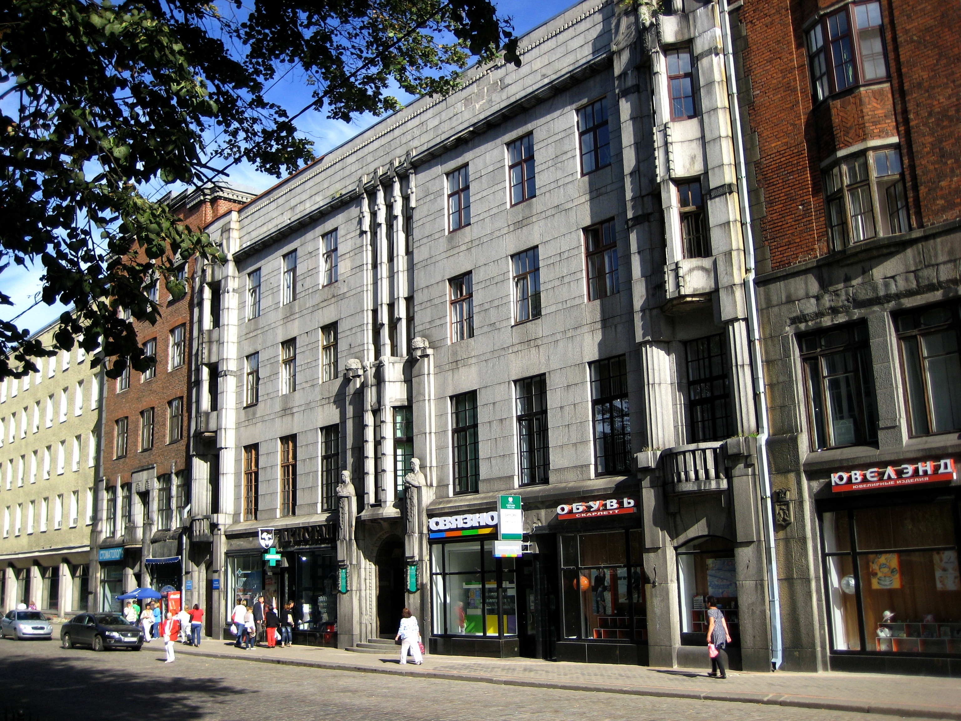 Бывший Финляндский торговый банк, ныне Сбербанк (Санкт-Петербург и Лен.область, Выборг, ленина пр., 12)